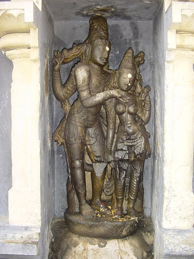 தொன்மையான கோயிலில் காணப்படும் அம்மையப்பர் சிலை வடிவம்